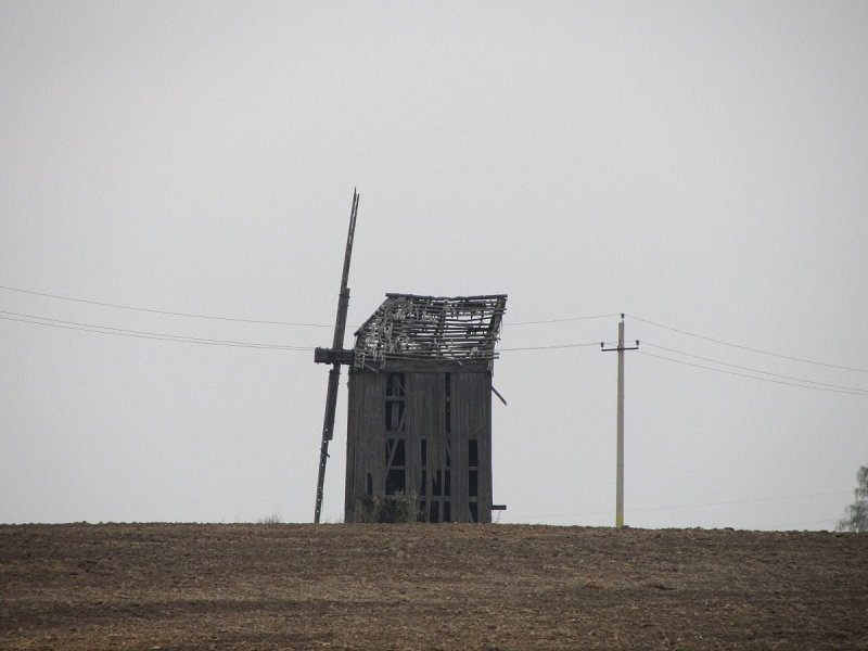 Урведзь. Вятрак